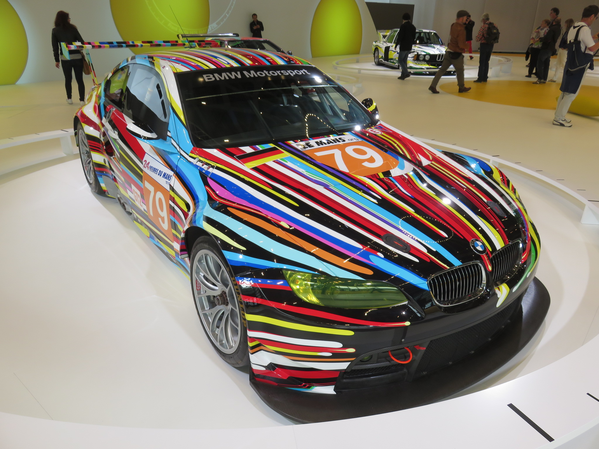 Concorso d'eleganza Villa d'Este 2015